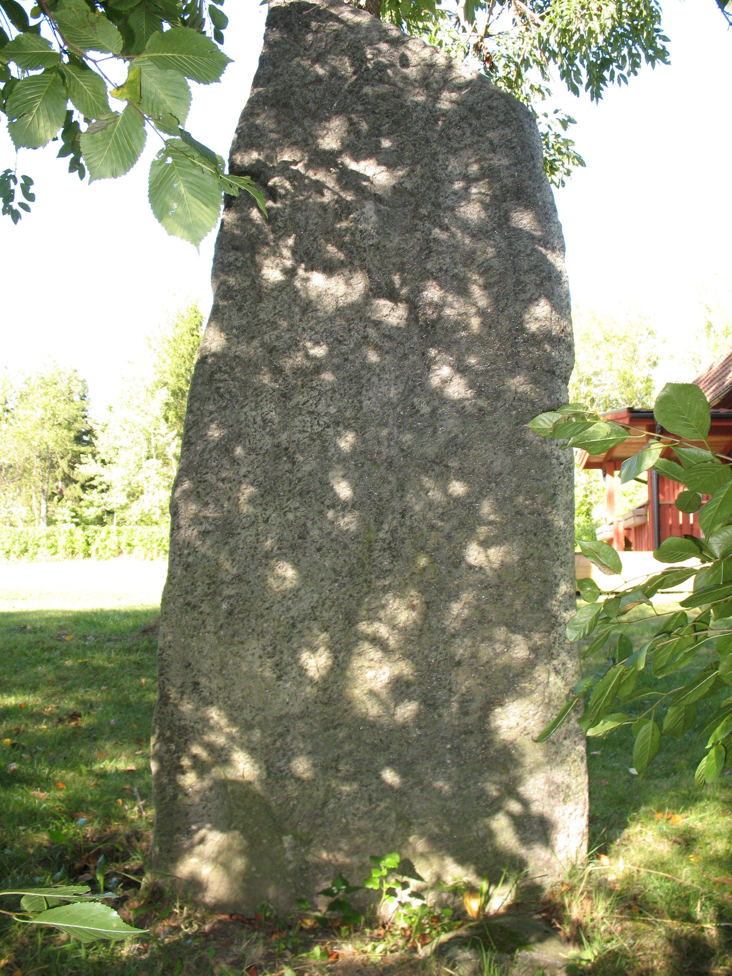 runestone